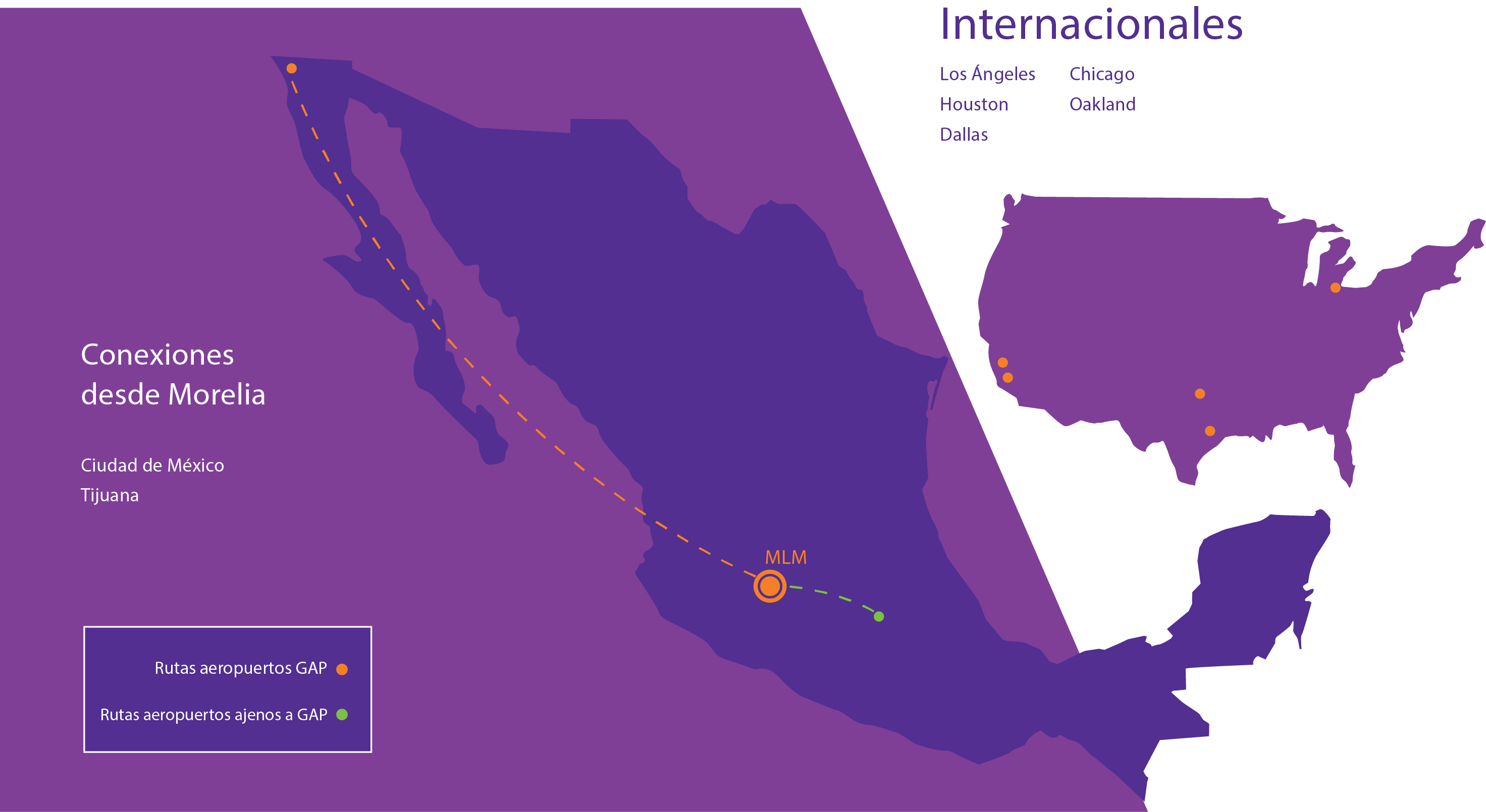 Aeropuerto Internacional de Morelia